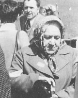 Immagine di Giuseppina Togni, detta "Mamma Togni"